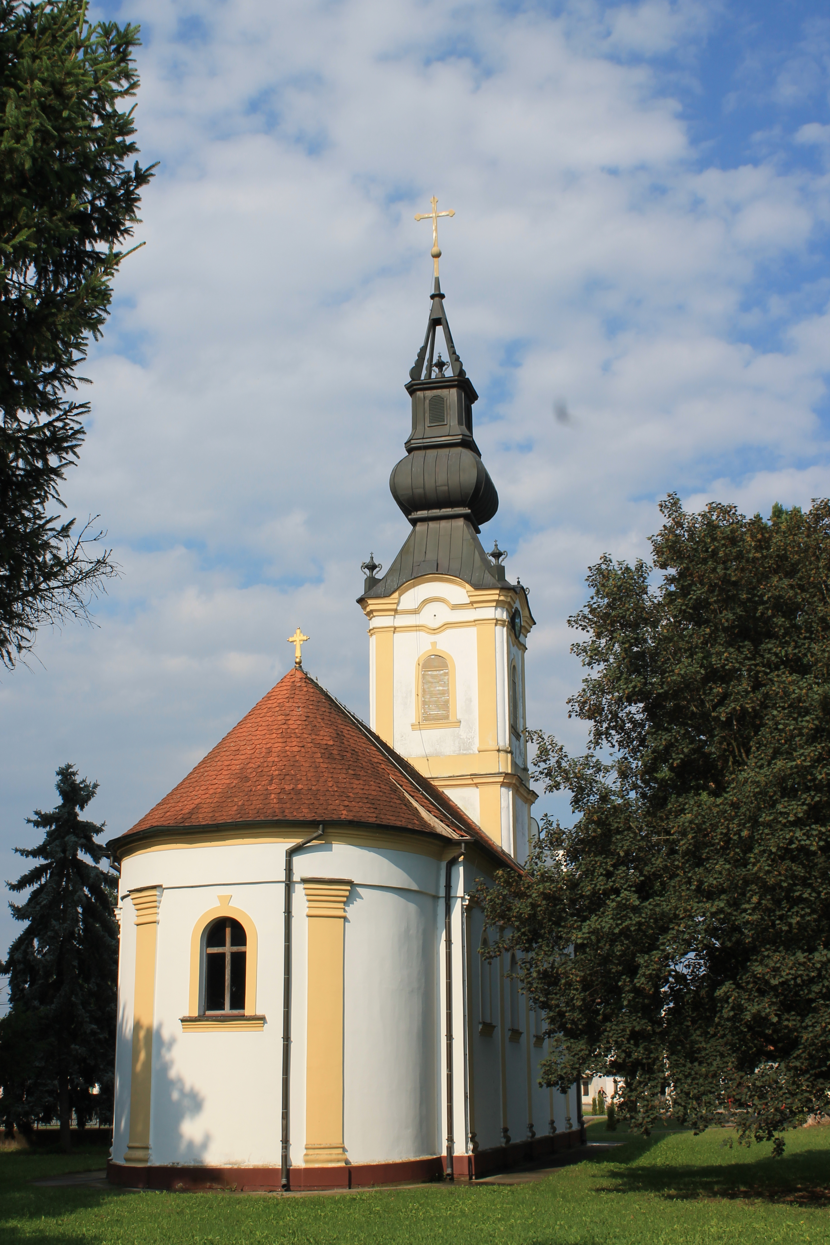 Crkva Sv. Georgija (Jamena)